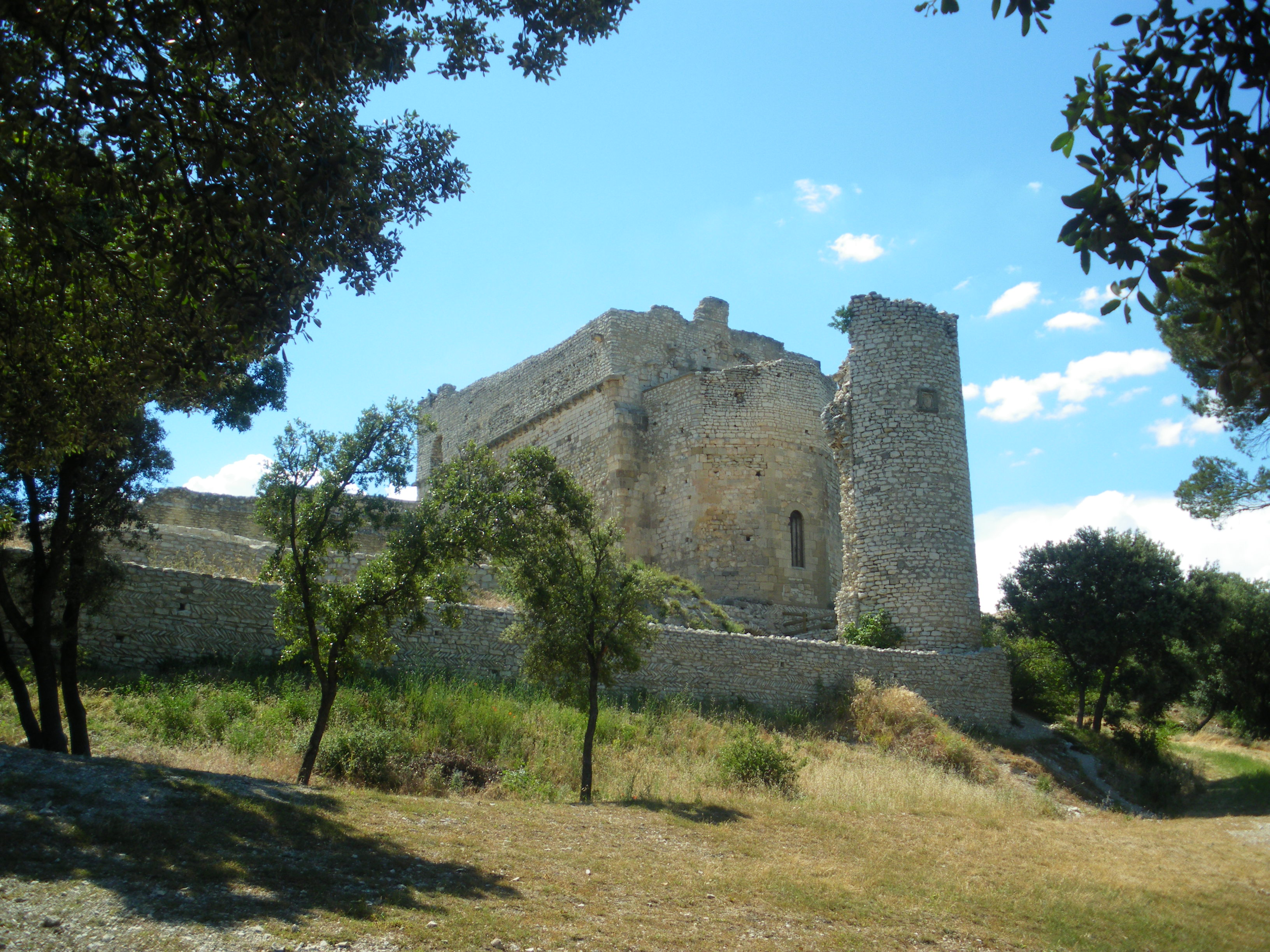 église Sainte Marie du Monastère du Thouzon, Le Thor, Vaucluse